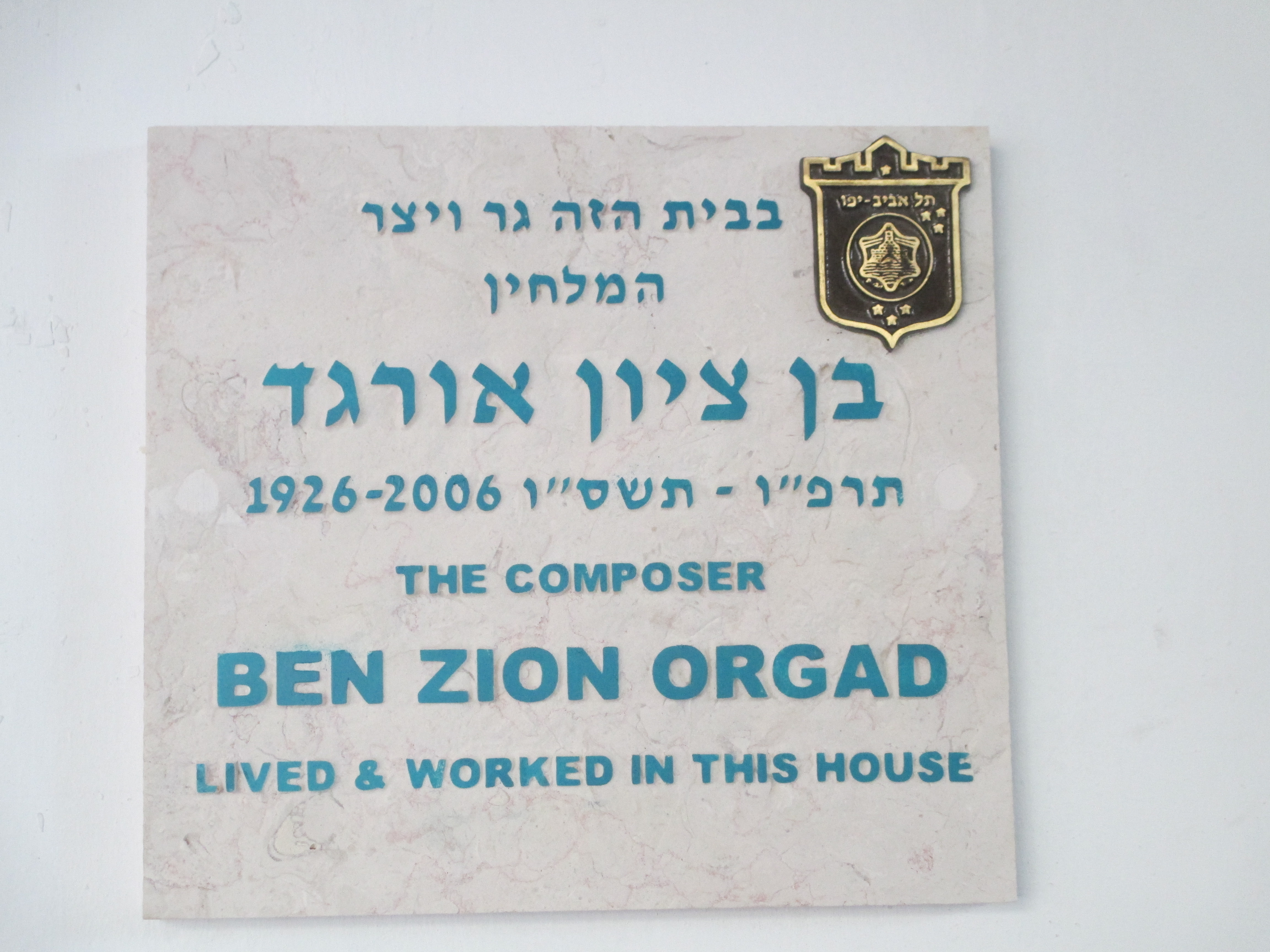 לוחית זיכרון למלחין בן ציון אורגד ברחוב בלוך 14 בתל אביב